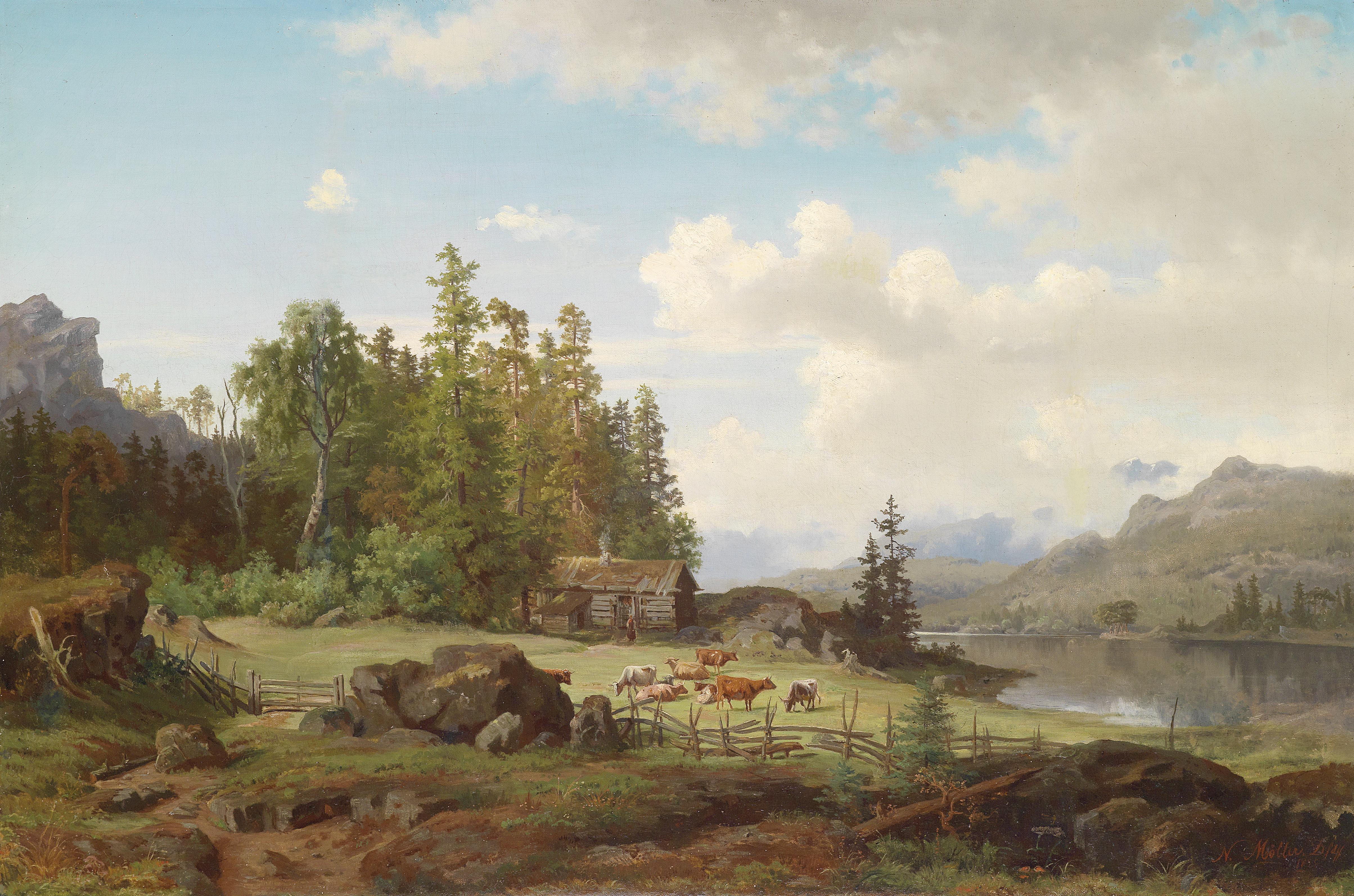 Seelandschaft mit weidenden Kühen